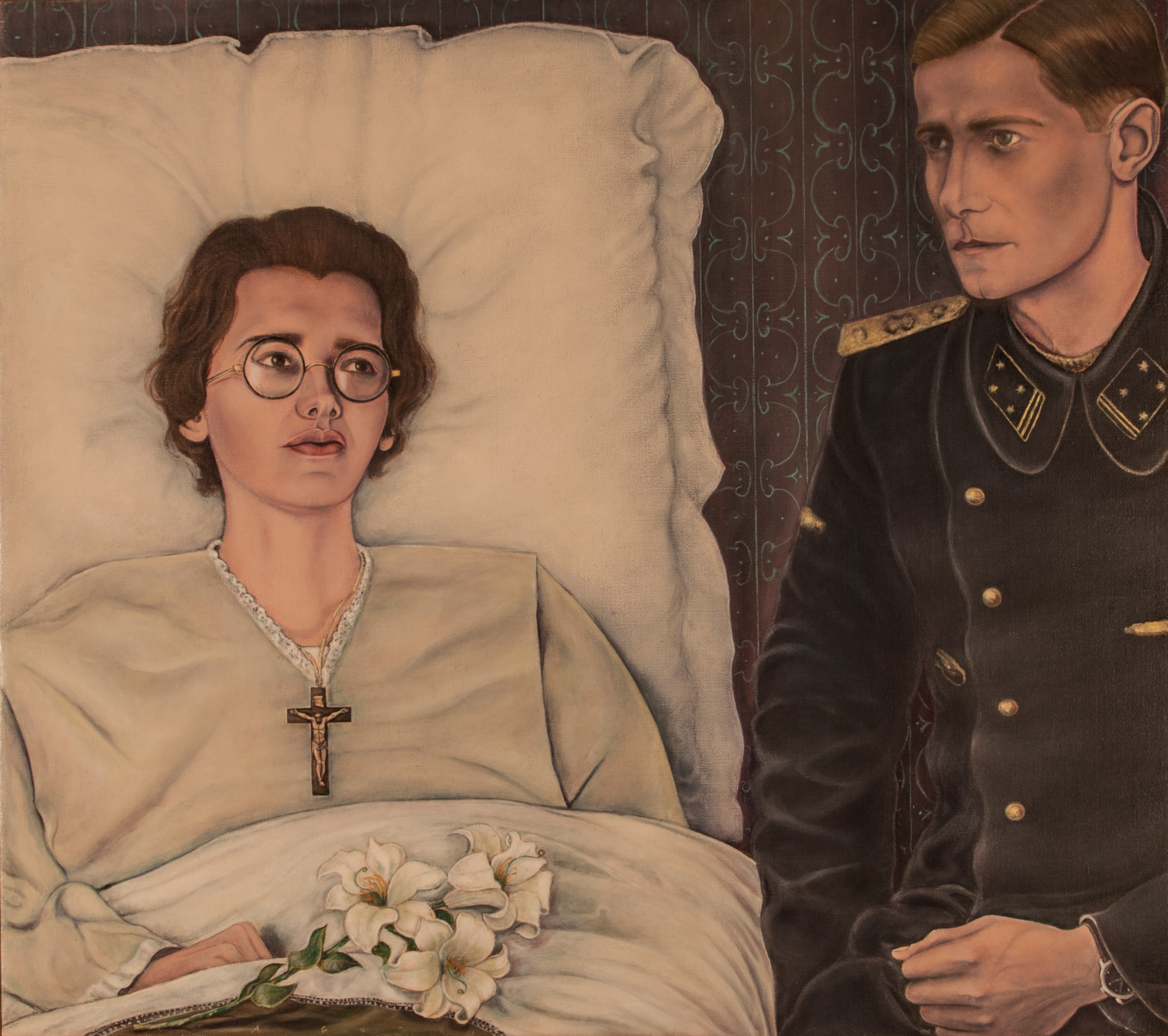 Marthe e Jochen, olio su tela di lino, cm. 80x90